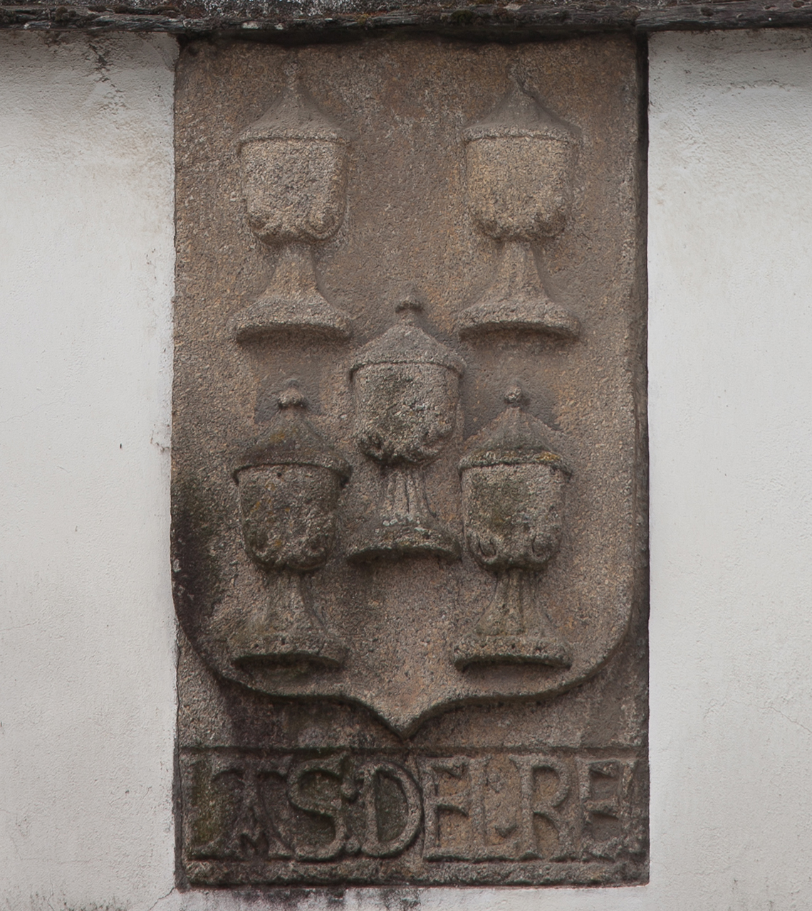 Escudo de Galiza procedente da antiga Porta da Vila de Betanzos, datado contra 1549.